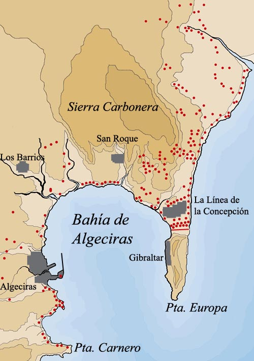 Mapa de los bunkers construidos a partir de 1939 en la Bahía de Algeciras.